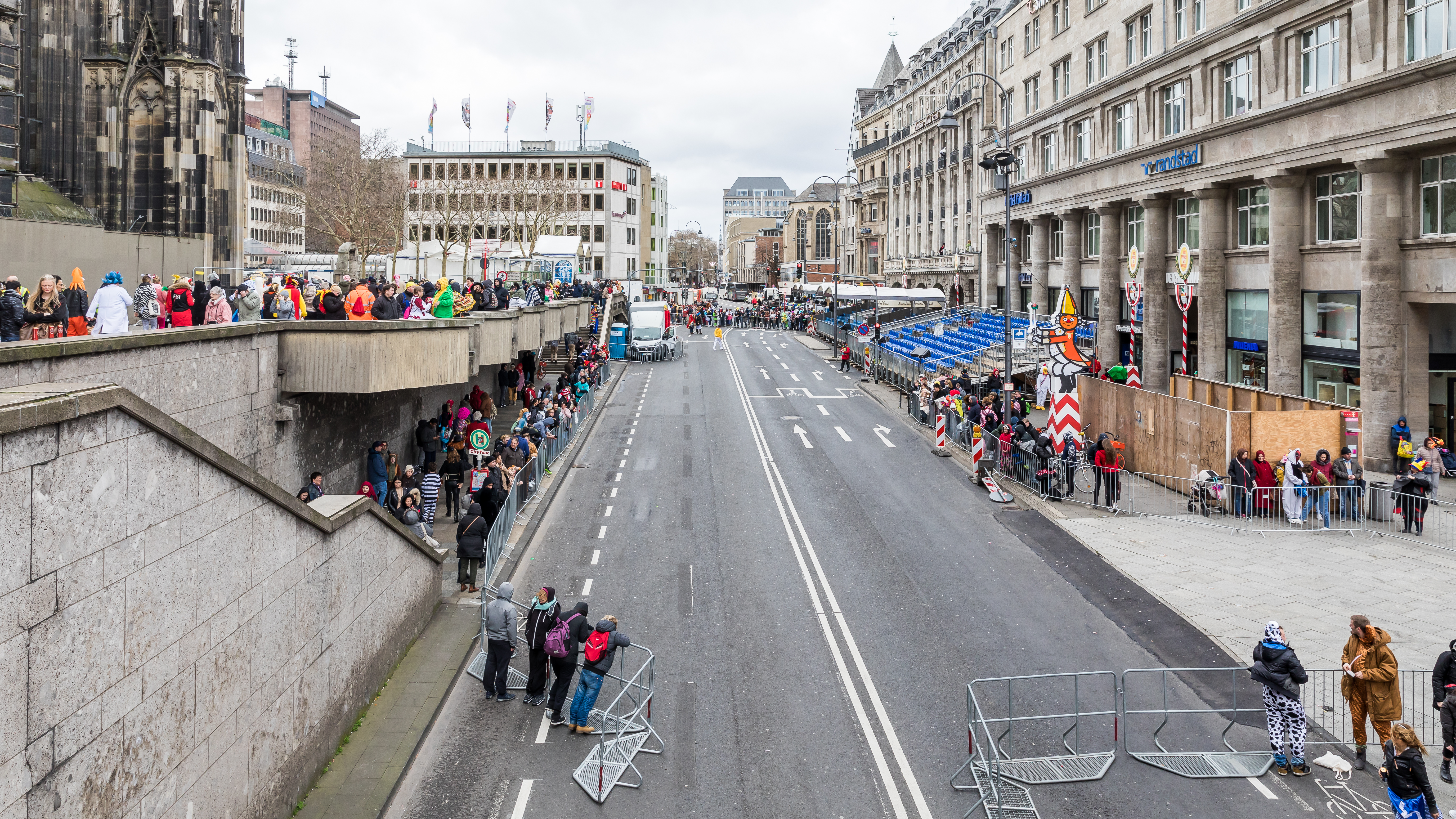 Karneval in Köln - Trankgasse. Zuschauer warten auf den Rosenmontagszug